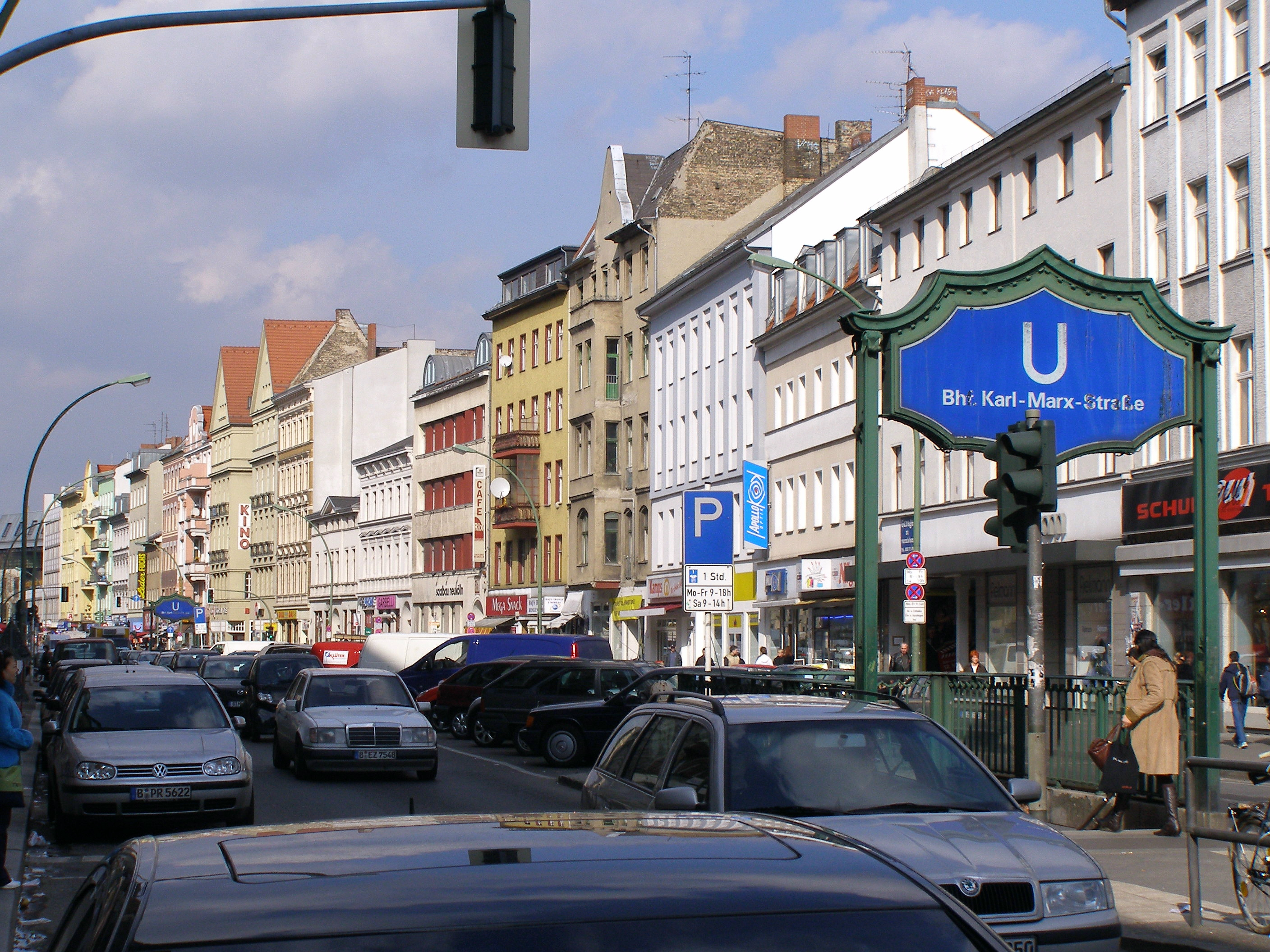 U-Bahn Haltestelle Karl-Marx-Straße (Berlin) underground station Karl-Marx-Straße (Berlin) stanice metra Karl-Marx-Straße (Berlín)